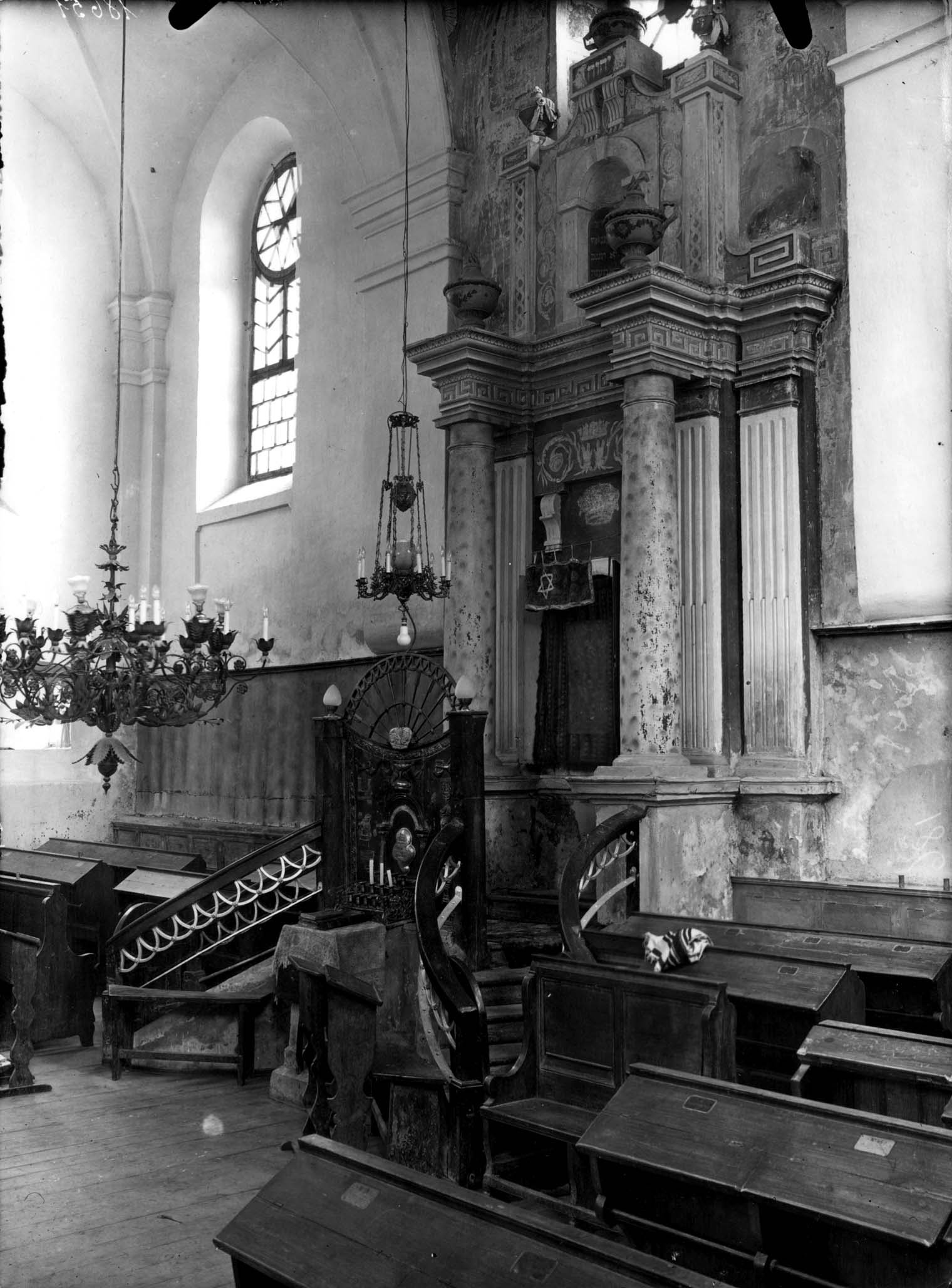 Беларуская (тарашкевіца): Наваградак (Navahradak), завулак Сынагогальны (zavułak Synagogalny). Вялікая Сынагога.